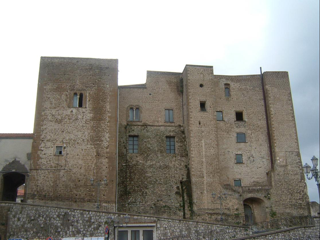 Sessa Aurunca(CE)- Castello ducale: Di origine preromana, Sessa Aurunca conserva ancora molte testimonianze storiche che permettono una ricostruzione del suo passato. Molti i popoli che l’hanno dominata (longobardi, normanni, angioini, aragonesi) lasciando tracce della loro presenza. Il Castello Ducale ne è un chiaro esempio. Costruito nel X sec., fu concepito come luogo di difesa ma anche come palatium, dove svolgere le attività ufficiali della corte. Con Federico II di Svevia, il complesso fu consolidato e ampliato con l’aggiunta di torri quadrangolari. Le trasformazioni continuarono con gli angioini, dei quali resta la straordinaria loggia del giardino pensile, e con la famiglia Marzano nel XIV sec., che abbellì la struttura con affreschi e decorazioni architettoniche di gusto castellano, come portali, archi, costoloni e colonne. Purtroppo vicende storiche e naturali hanno danneggiato la struttura originaria, con la perdita di molti elementi. Di proprietà pubblica dagli inizi dell’800, fu sede carceraria fino al secolo scorso, quando si decise di valorizzare il sito con restauri. Oggi, oltre ad ospitare una biblioteca e sale per eventi, ospita il Museo Civico archeologico.